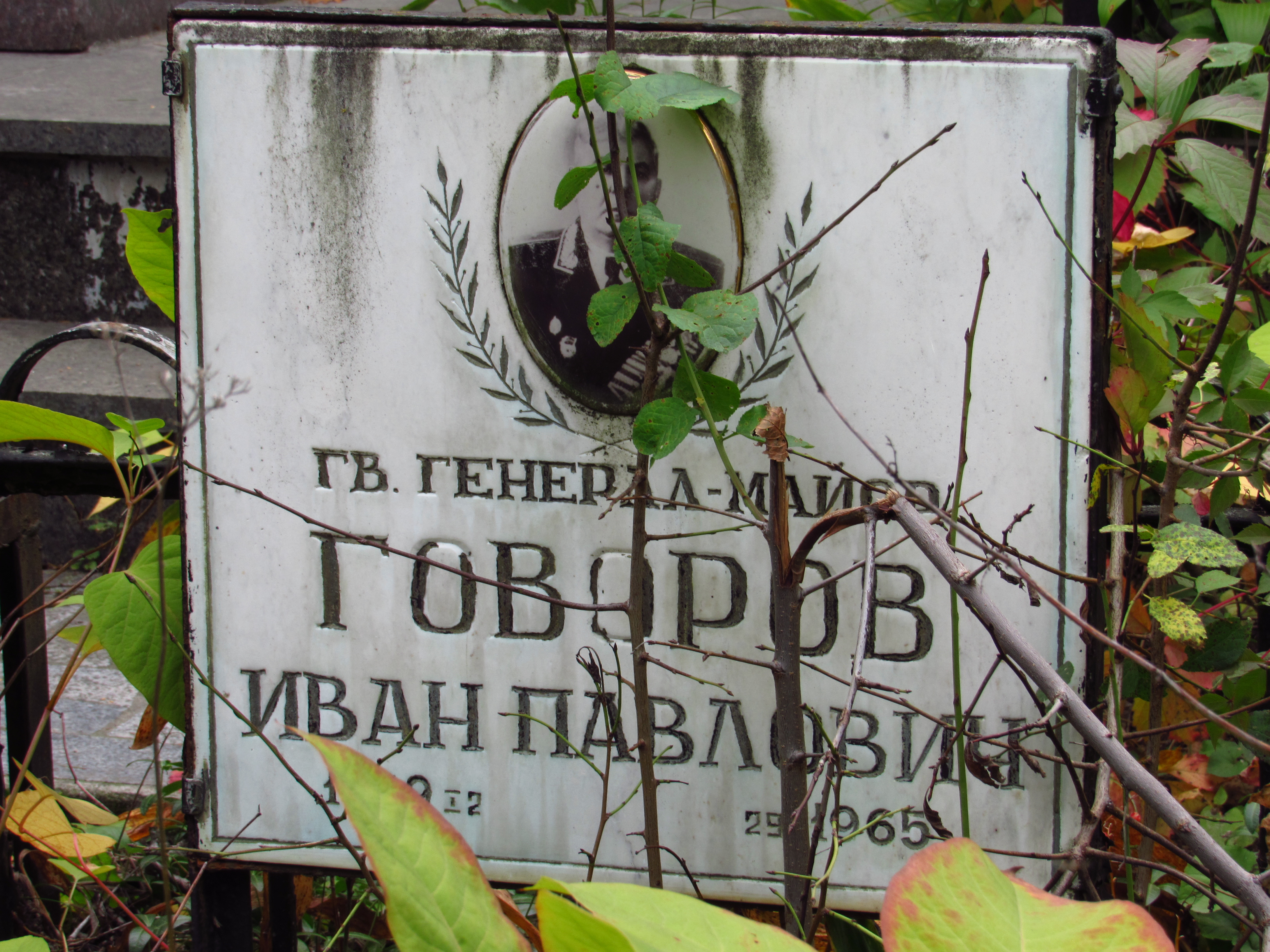 Могила Говорова І. П., учасника громадянської і Великої Вітчизняної війн, Київ, Байкова вул., 6, діл. 46